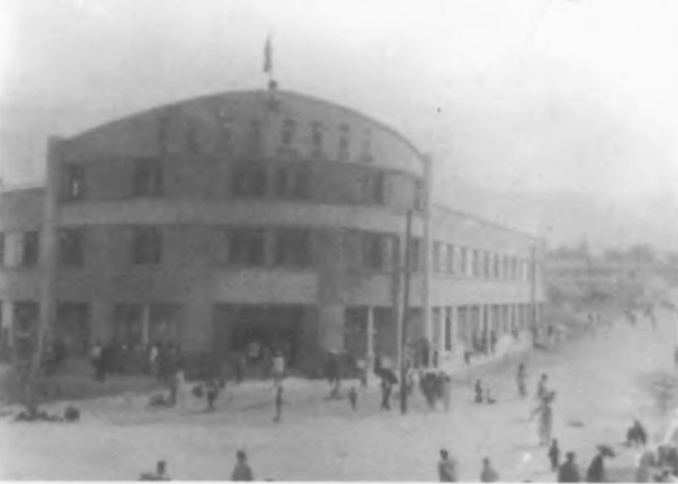 1958年的芒市百货大楼